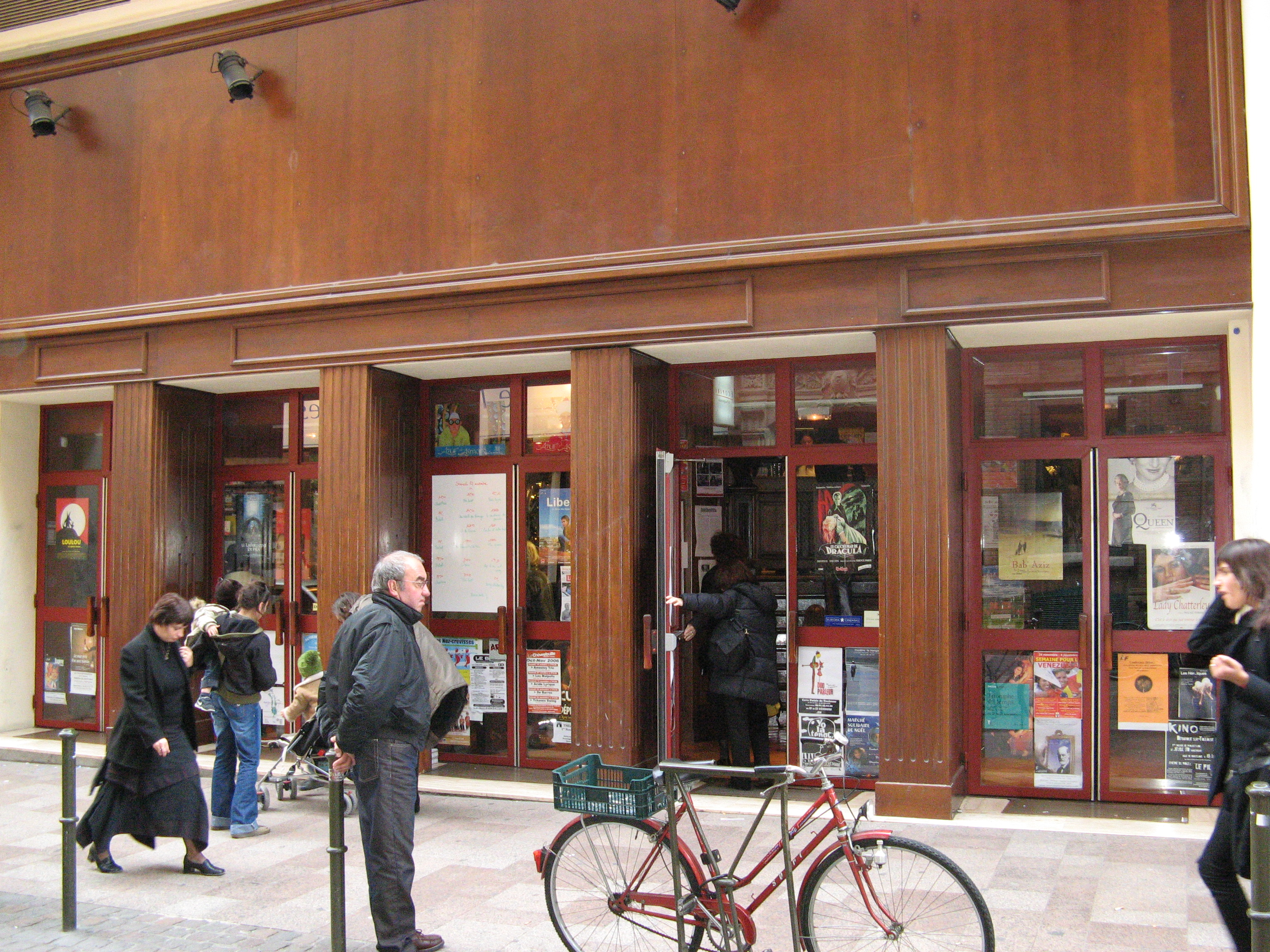 Cinéma "Utopia", rue Montardy à Toulouse (Haute-Garonne, France).